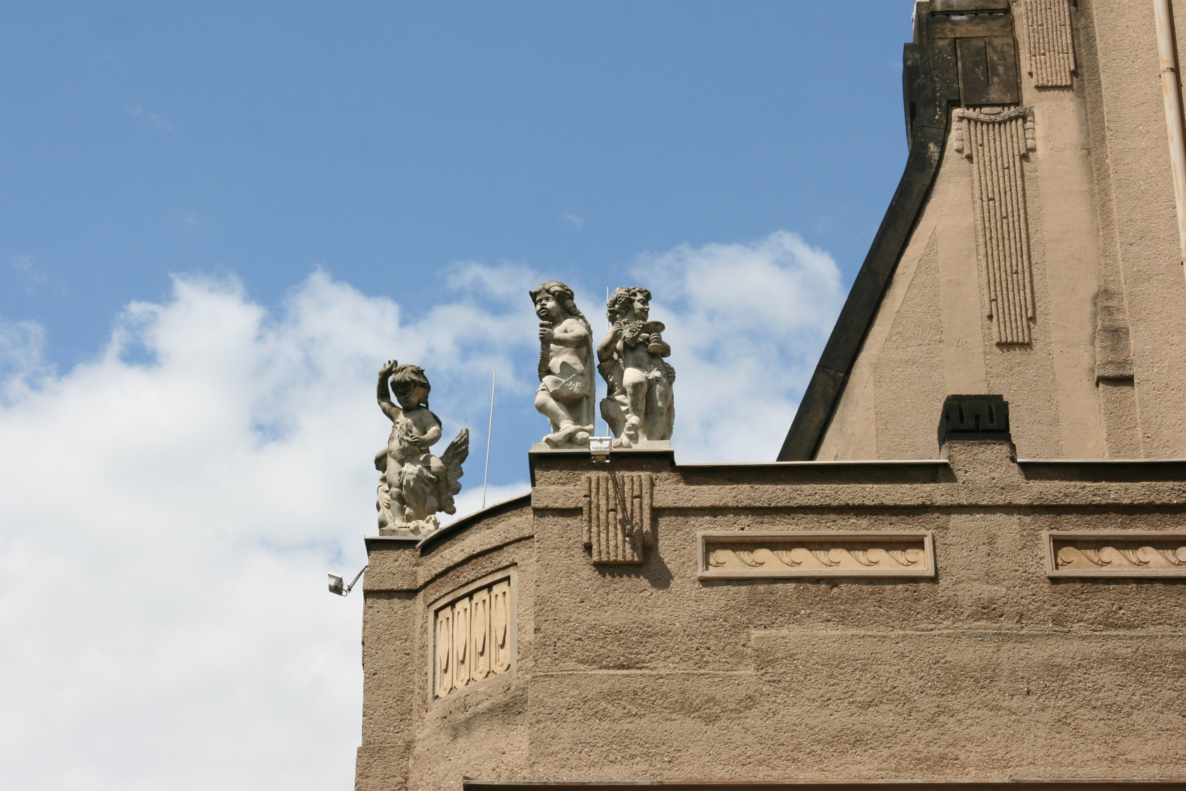 Stadthalle, Am Stadtpark in Görlitz